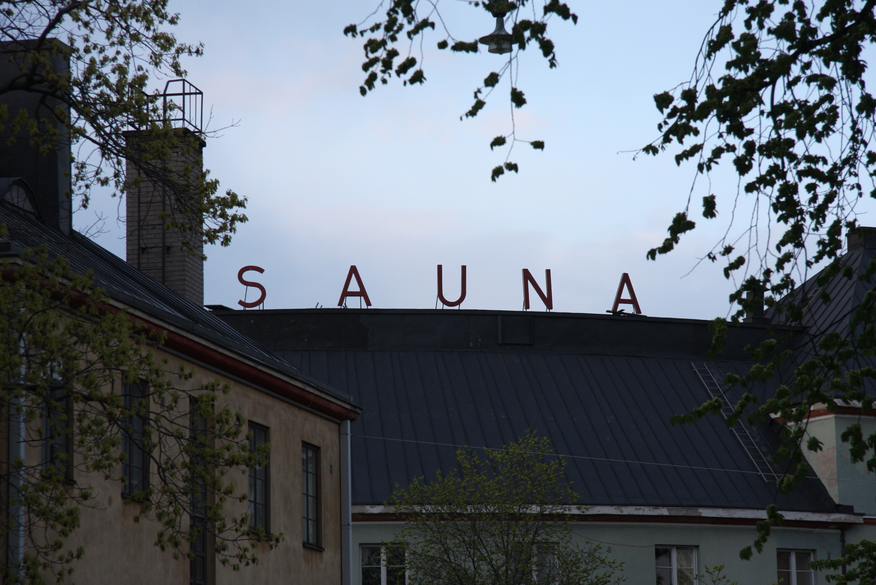 Kotiharjun Sauna's Neon sign seen from Torkkelinmäki, Helsinki, Finland